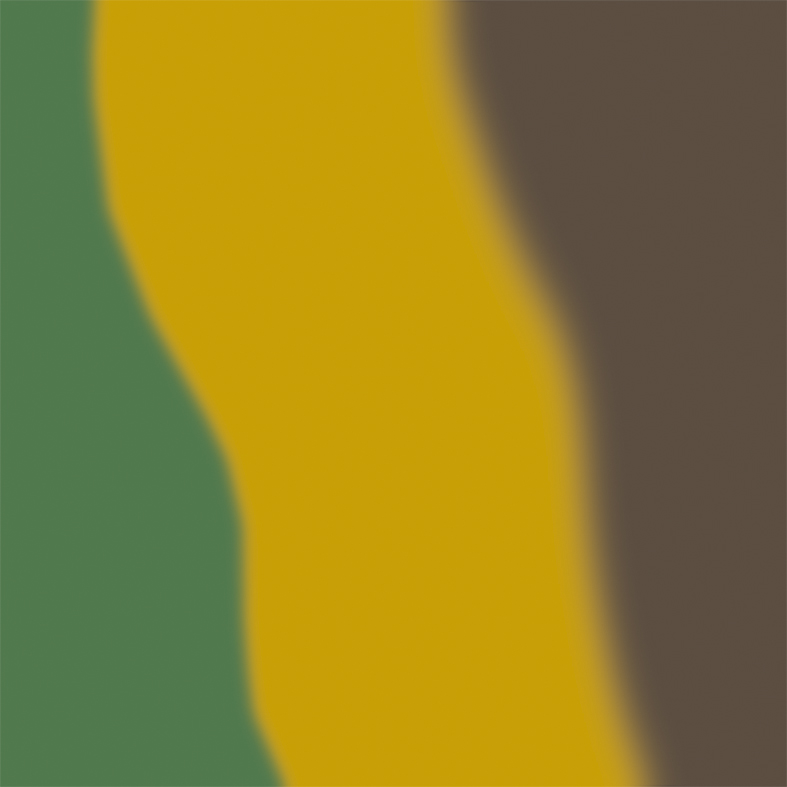 Muster des Buntfarbenanstrichs 1918 in einer späten gespritzten Version der 1930er Jahre